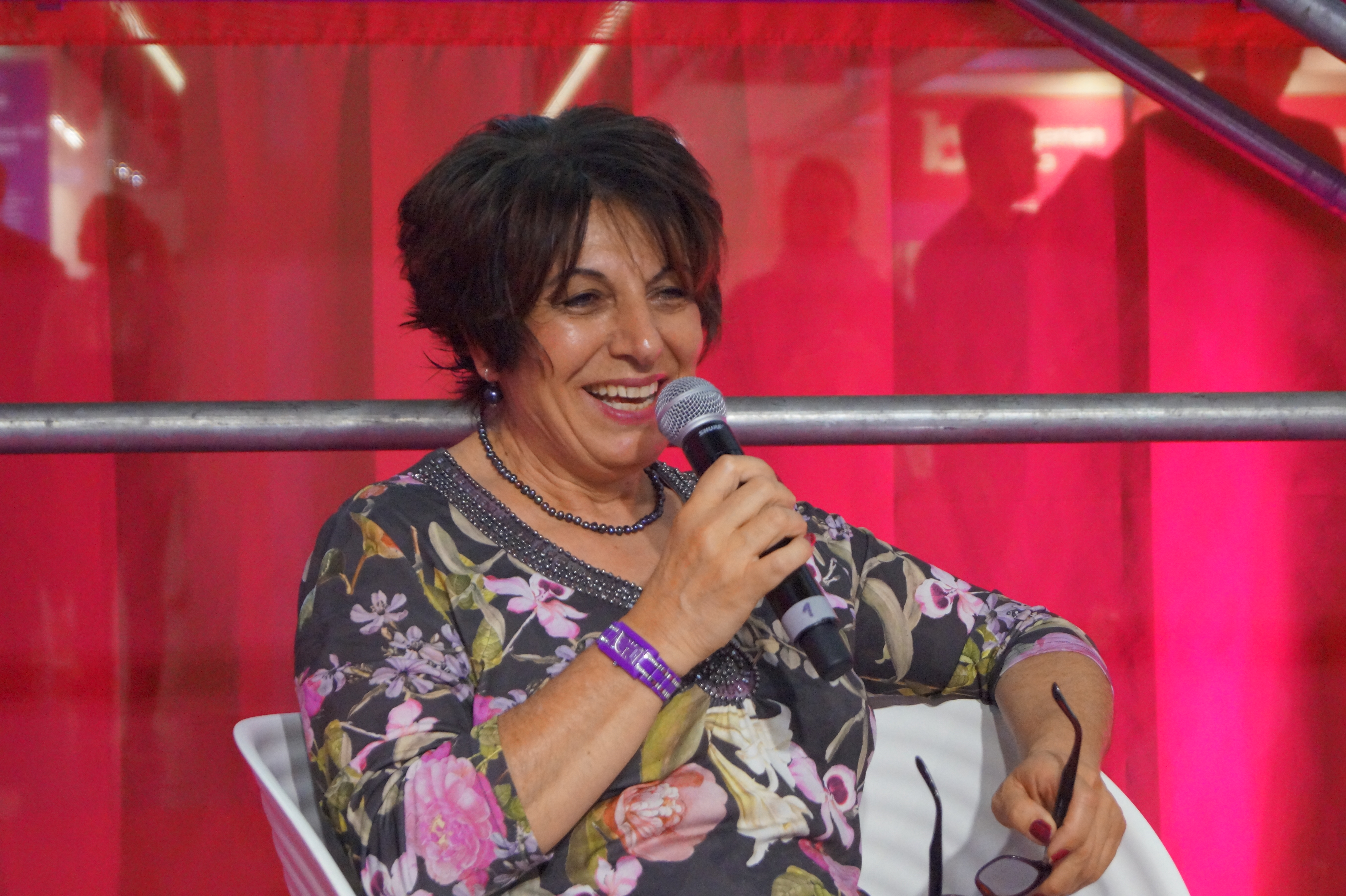 Agapi Mkrtchian (armenische Übersetzerin) liest auf der Frankfurter Buchmesse 2019